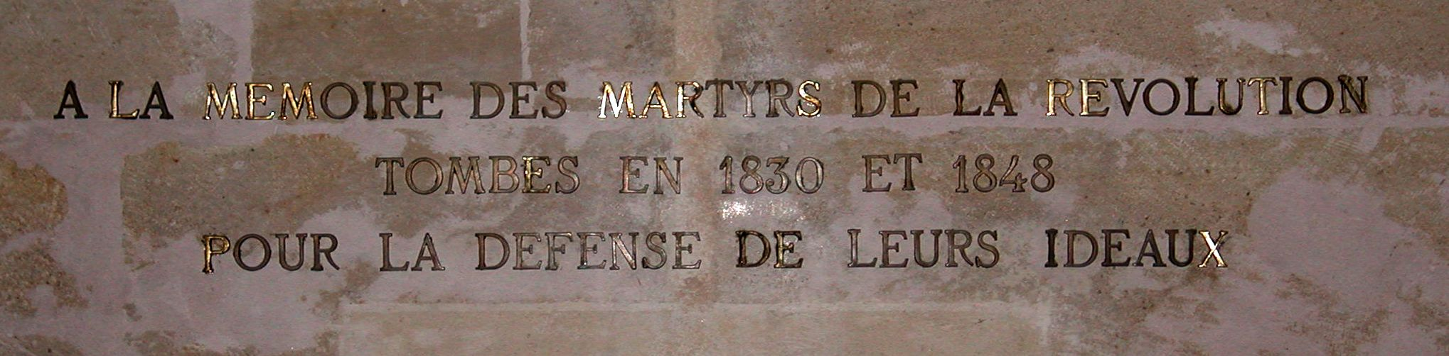 Inscription pour les martyrs de la Révolution (1830 et 1848)